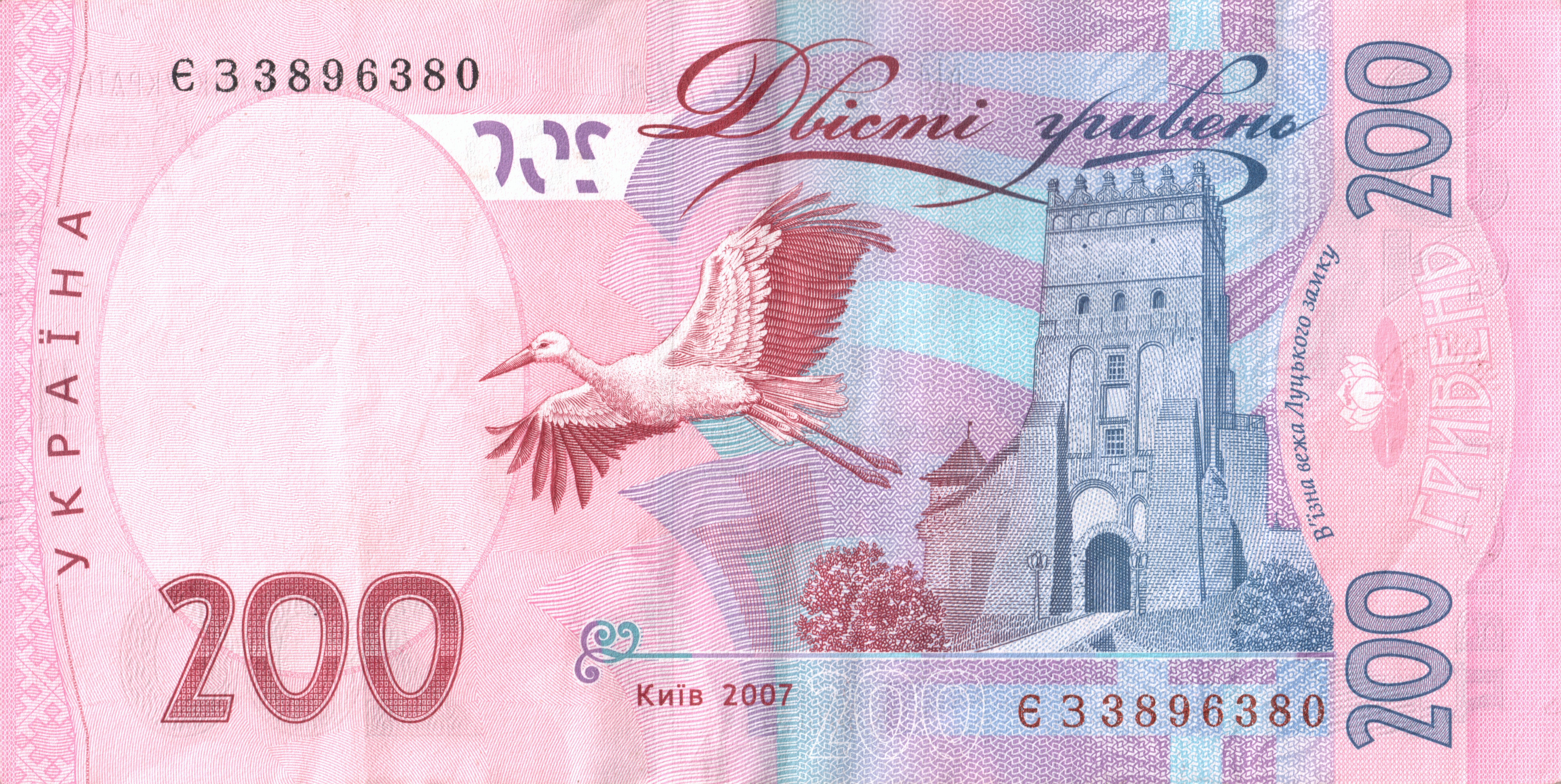 Новая банкнота в 200 гривен образца 2007 года, Украина. Оборотная сторона. Цвета естественные